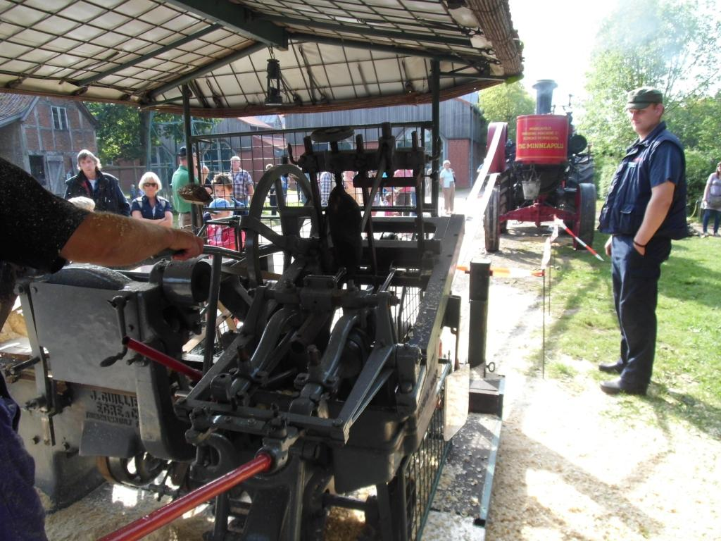 Mit Dampf betriebene Maschine zur Fertigung von Holzschuhen